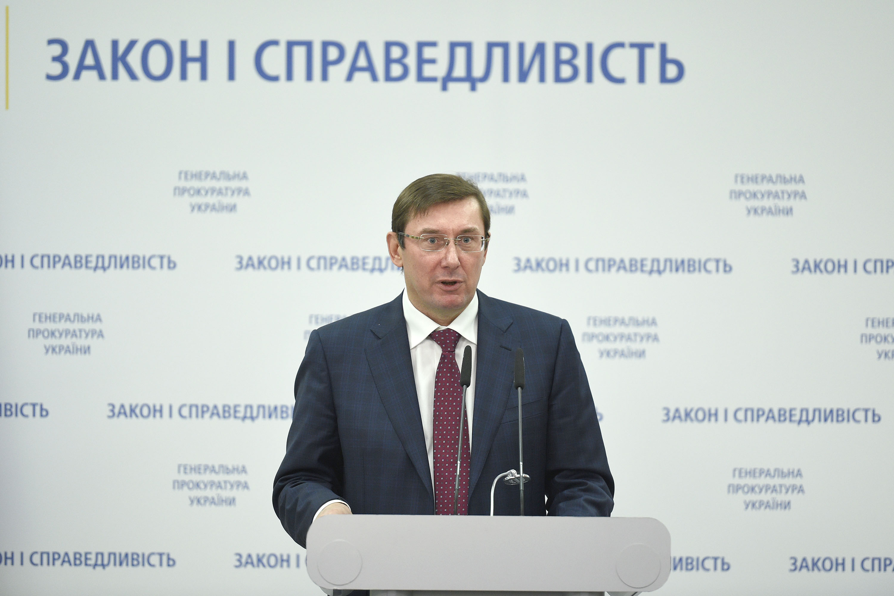 Юрій Луценко на прес-конференції 15 лютого 2017 року підводить підсумки роботи на посаді Генпрокурора за 2016 рік.